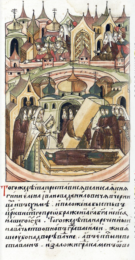 ЛИЦЕВОЙ ЛЕТОПИСНЫЙ СВОД В том году преставилась великая княгиня Елена, Ивана Даниловича, черница в схиме, и положена была в церкви святого Преображения Господа Бога и Спаса нашего Исуса Христа.